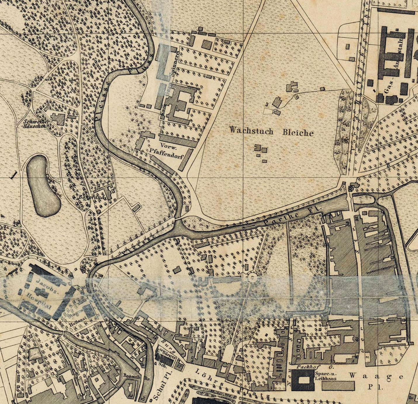 Das Vorwerk Pfaffendorf bei Leipzig.Ausschnitt aus G. Hetzel: Plan von Leipzig und die im Osten angrenzenden Dörfer. Zusammengestellt und gezeichnet von G. Hetzel. 1:7.000. 2. Abdr., Hinrichs'sche Buchhandlung, Leipzig 1864.